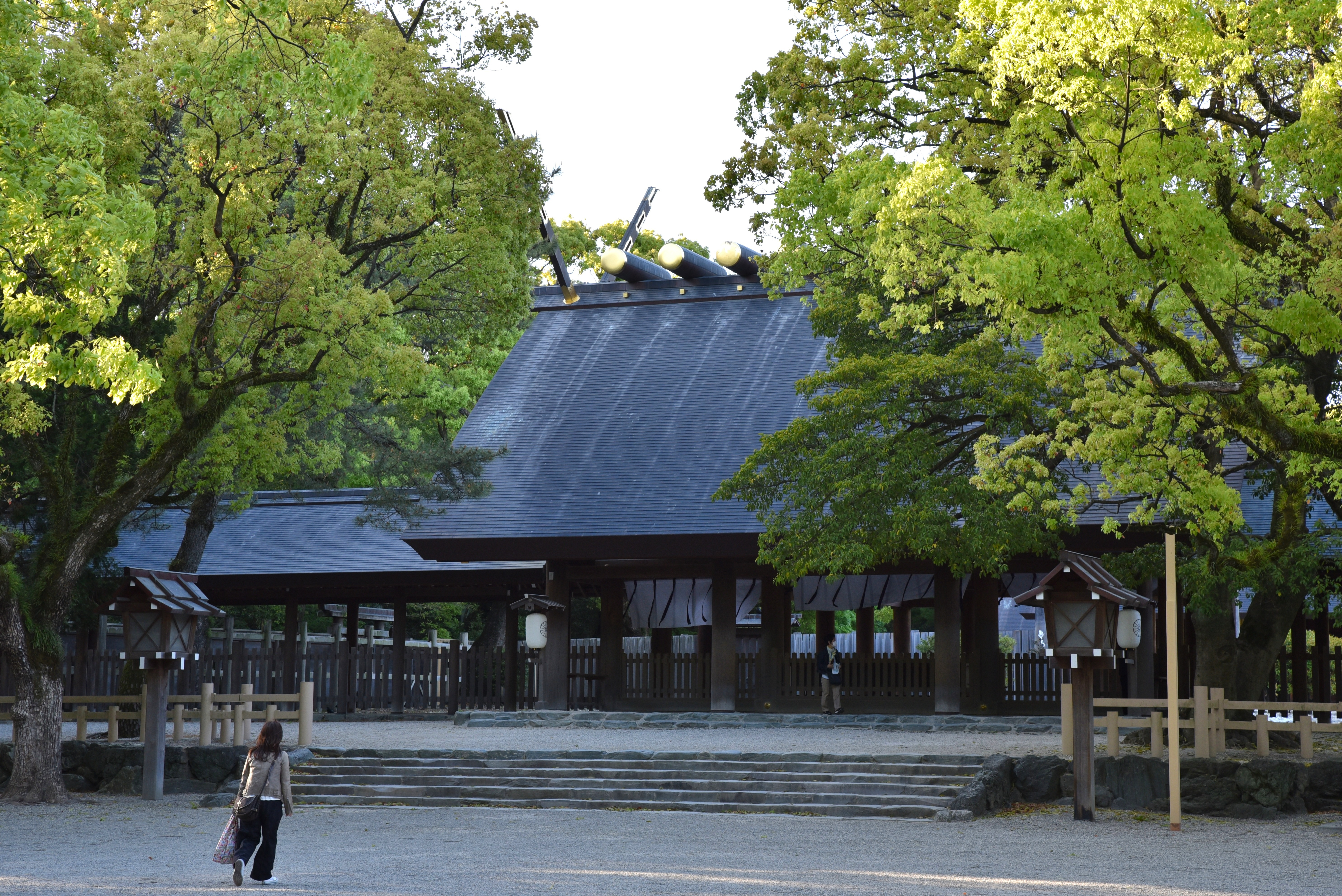 熱田神宮拝殿